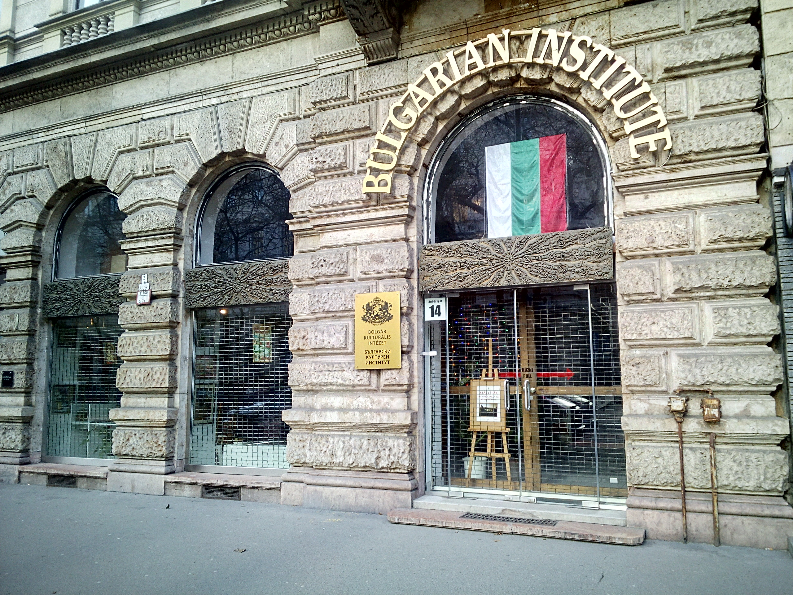 Bolgár Kulturális Intézet bejárata - Budapest, district 6, Andrássy út 14.